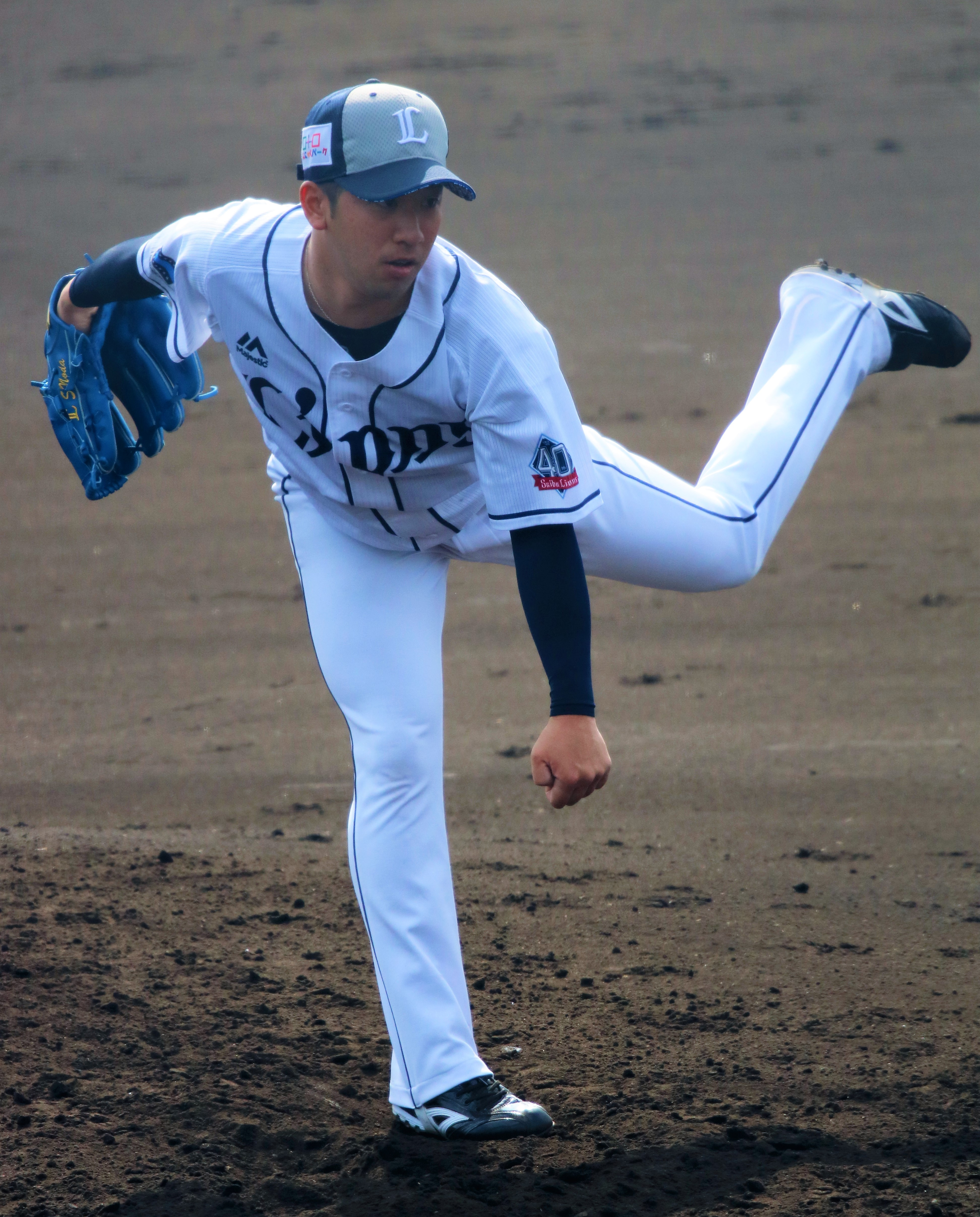 2018/2/9 宮崎・南郷キャンプ